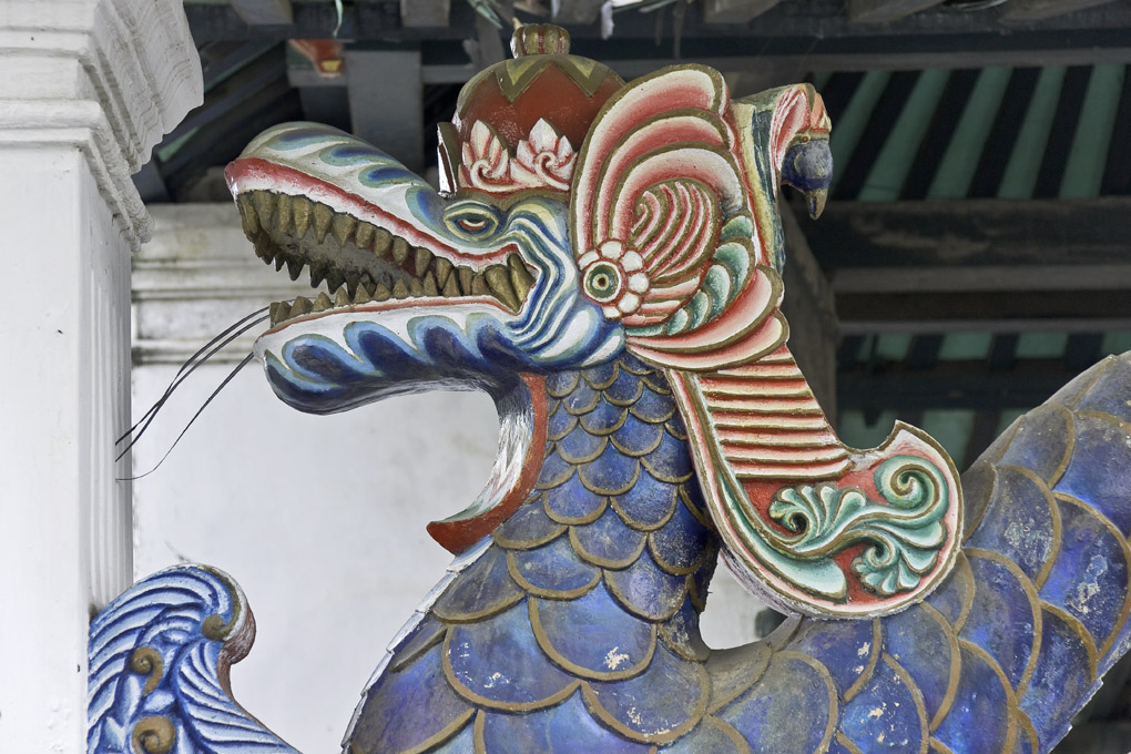 Dwi Naga Rasa Tunggal